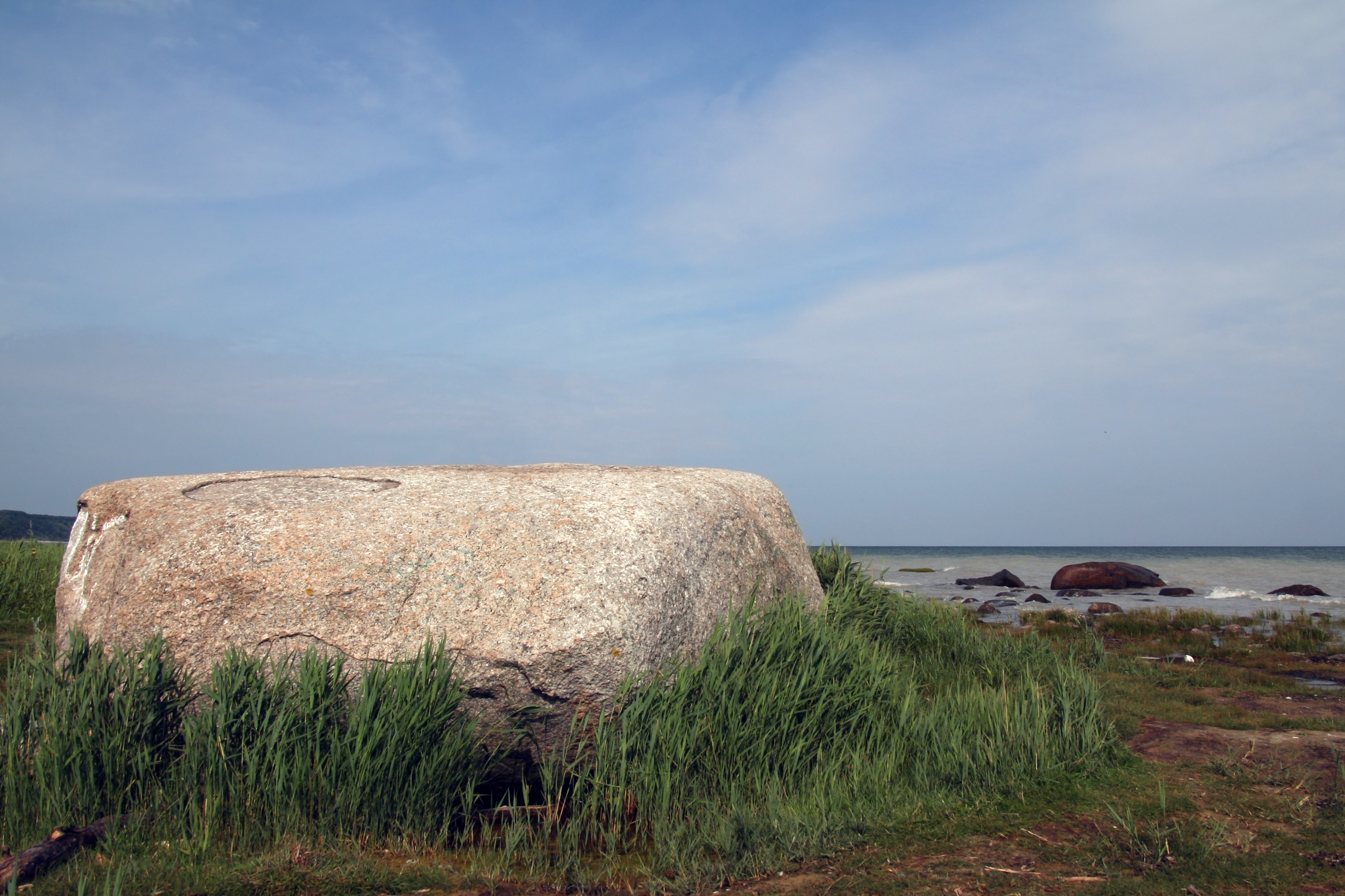 Siebenschneiderstein, Ruegen island, Germany